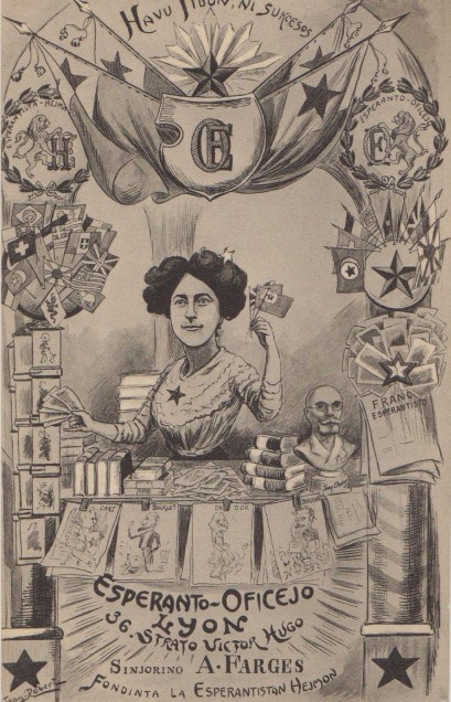 Alice-Leontine Farges en karikaturo de Jean-Robert, meze de esperantajxoj, kiujn sxi vendis en sia oficejo en Lyon, Francio